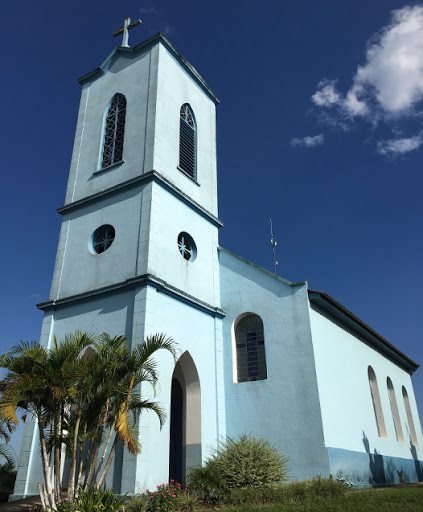 Igreja Matriz da Cidade de Araricá